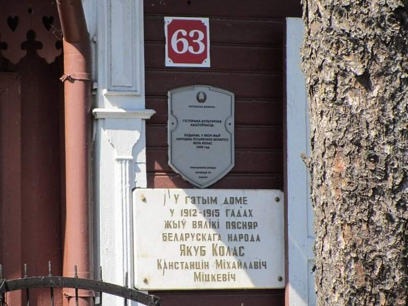 Пінск. Дом, дзе жыў Якуб Колас